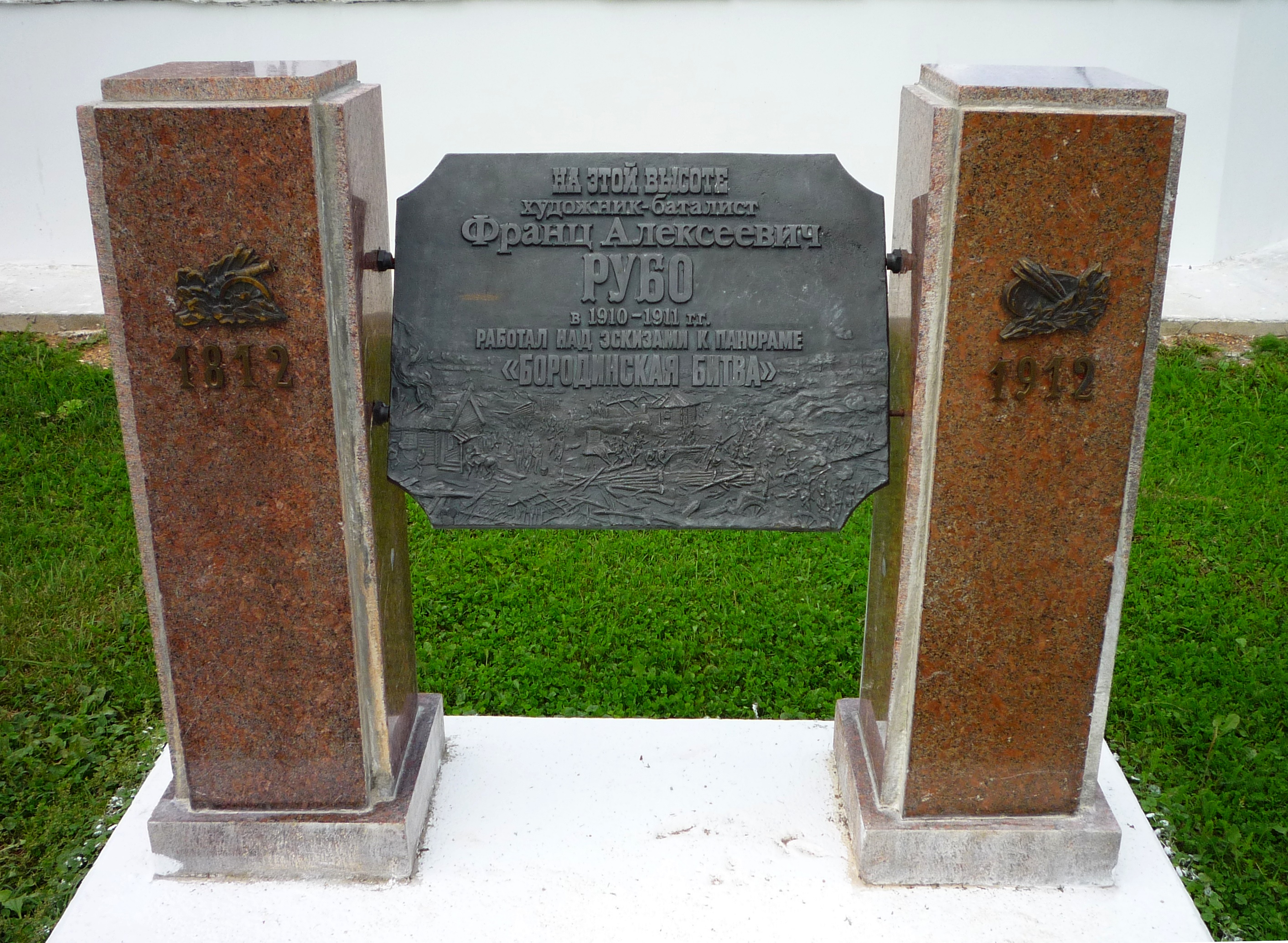 Памятный знак: художнику Ф. А. Рубо (место, с которого в 1910-1911 гг. Рубо писал эскизы к панораме «Бородинская битва»): Семёновское, Можайский район, Московская область